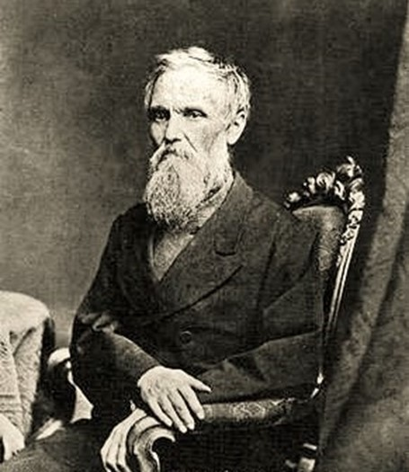 Gordij Semënovič Sablukov (1803-1880), celebre orientalista russo, autore della prima traduzione russa del Corano, professore di Nikolaj Černyševskij al Seminario Teologico di Saratov